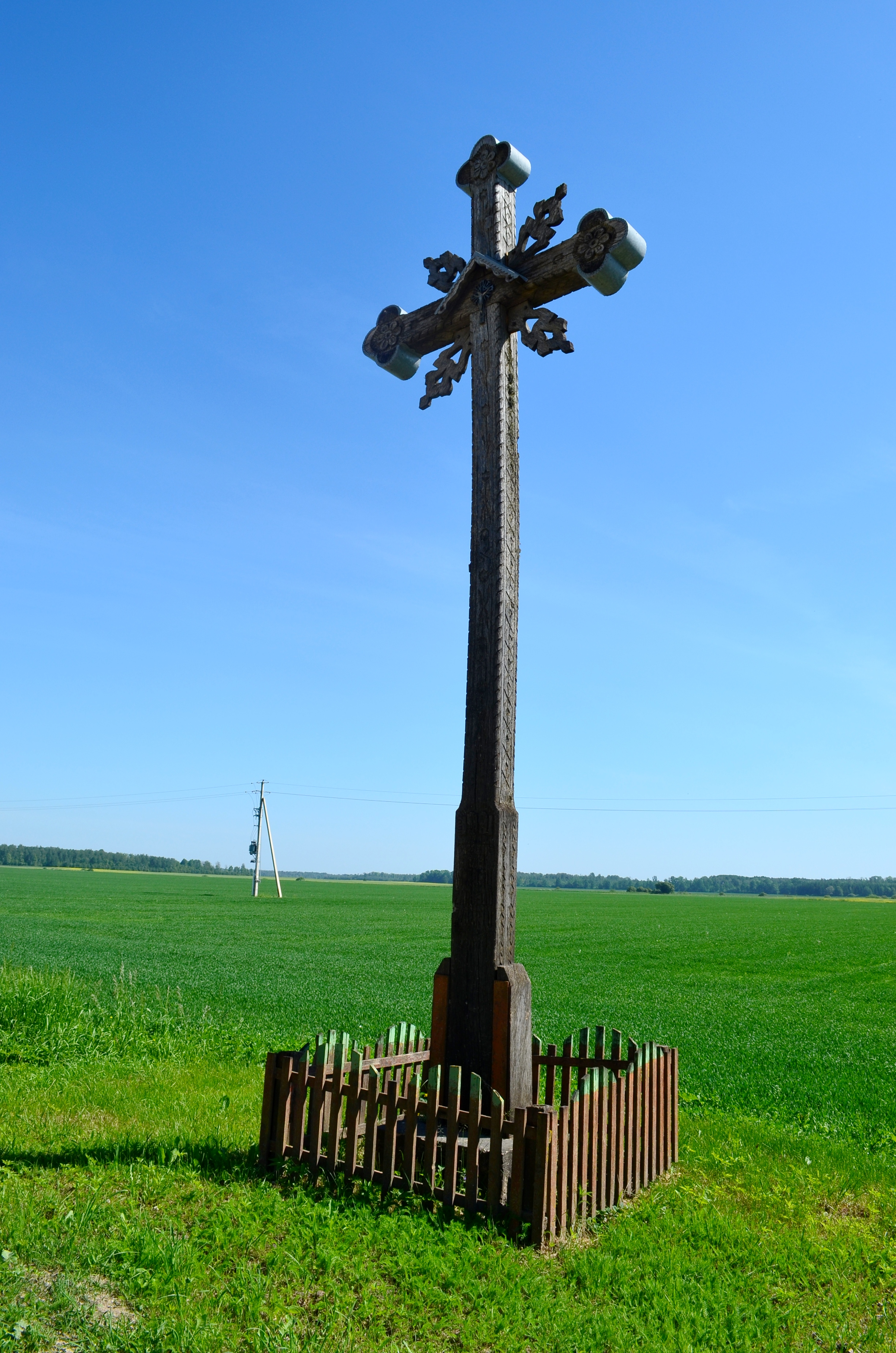 Kryžius Žybartuose, Radviliškio raj.